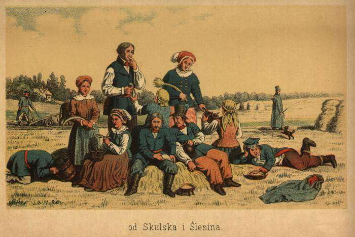 „Od Skulska i Ślesina“ (Aus Skulsk und Ślesin). Polnische Bauern aus Wielkopolska (Großpolen). Ansichtskarte.